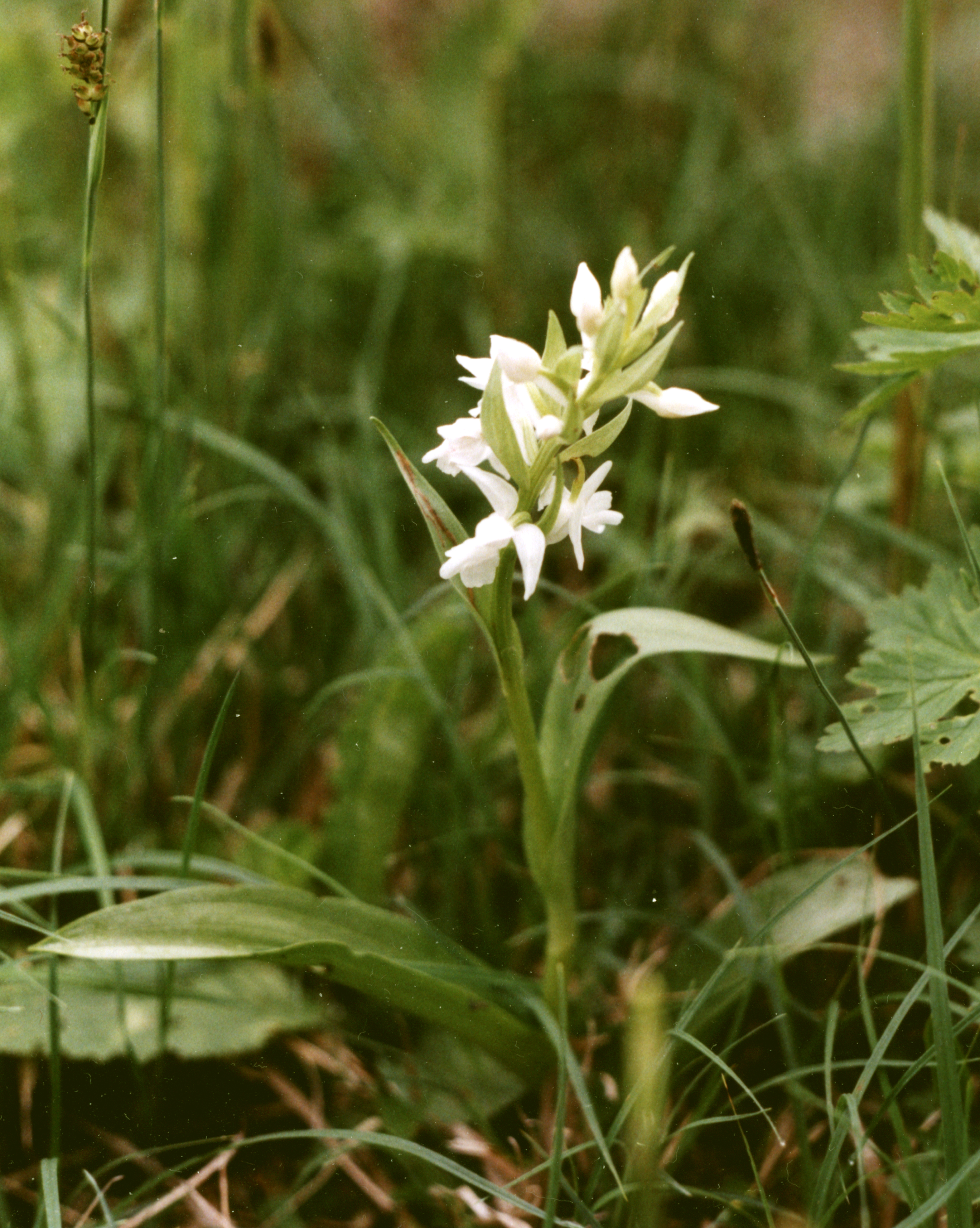 Dactylorhiza majalis Albino